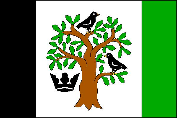 Vlajka obce Krasov